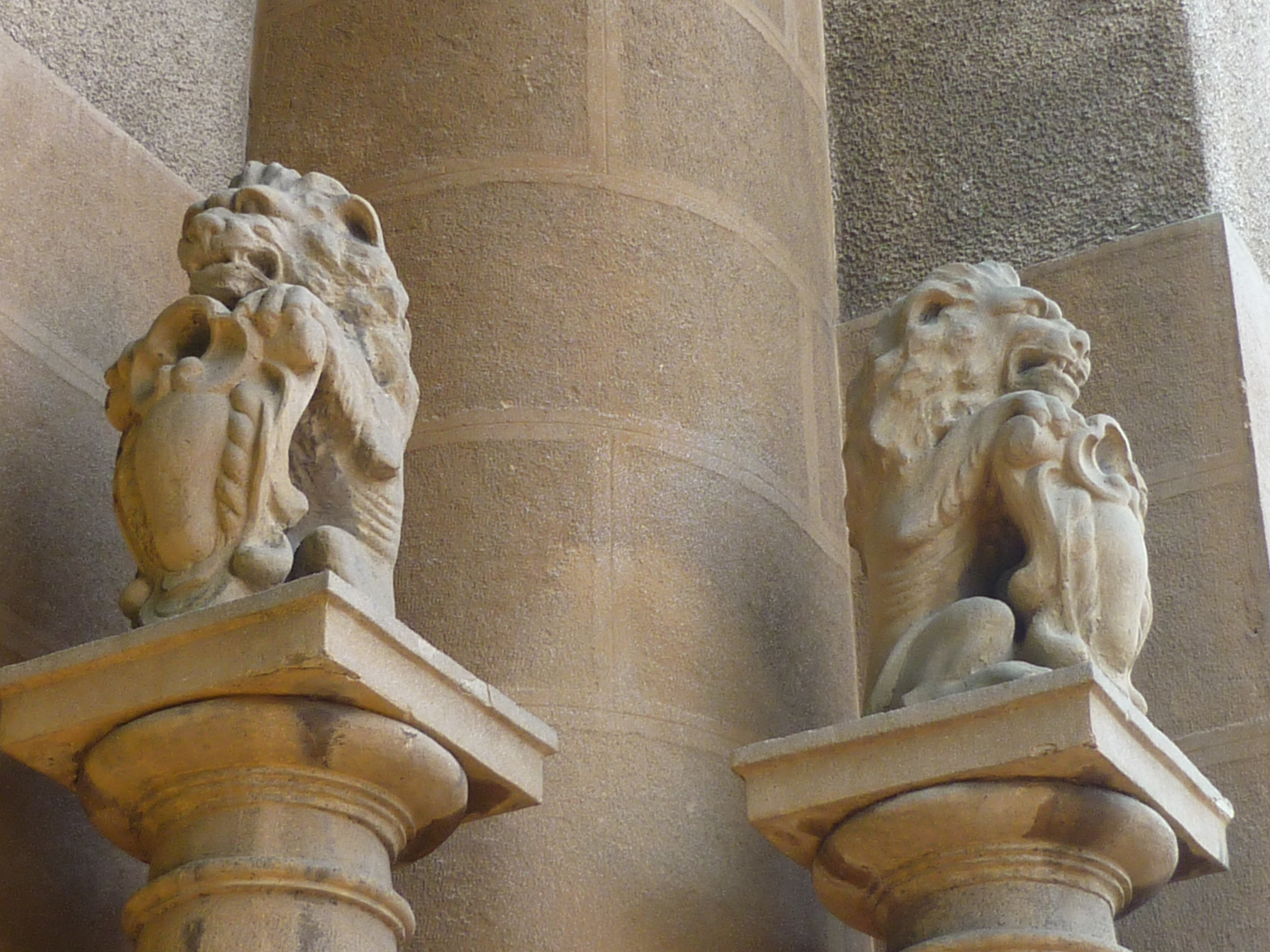 Leones de la Villa Ikust-Alaia